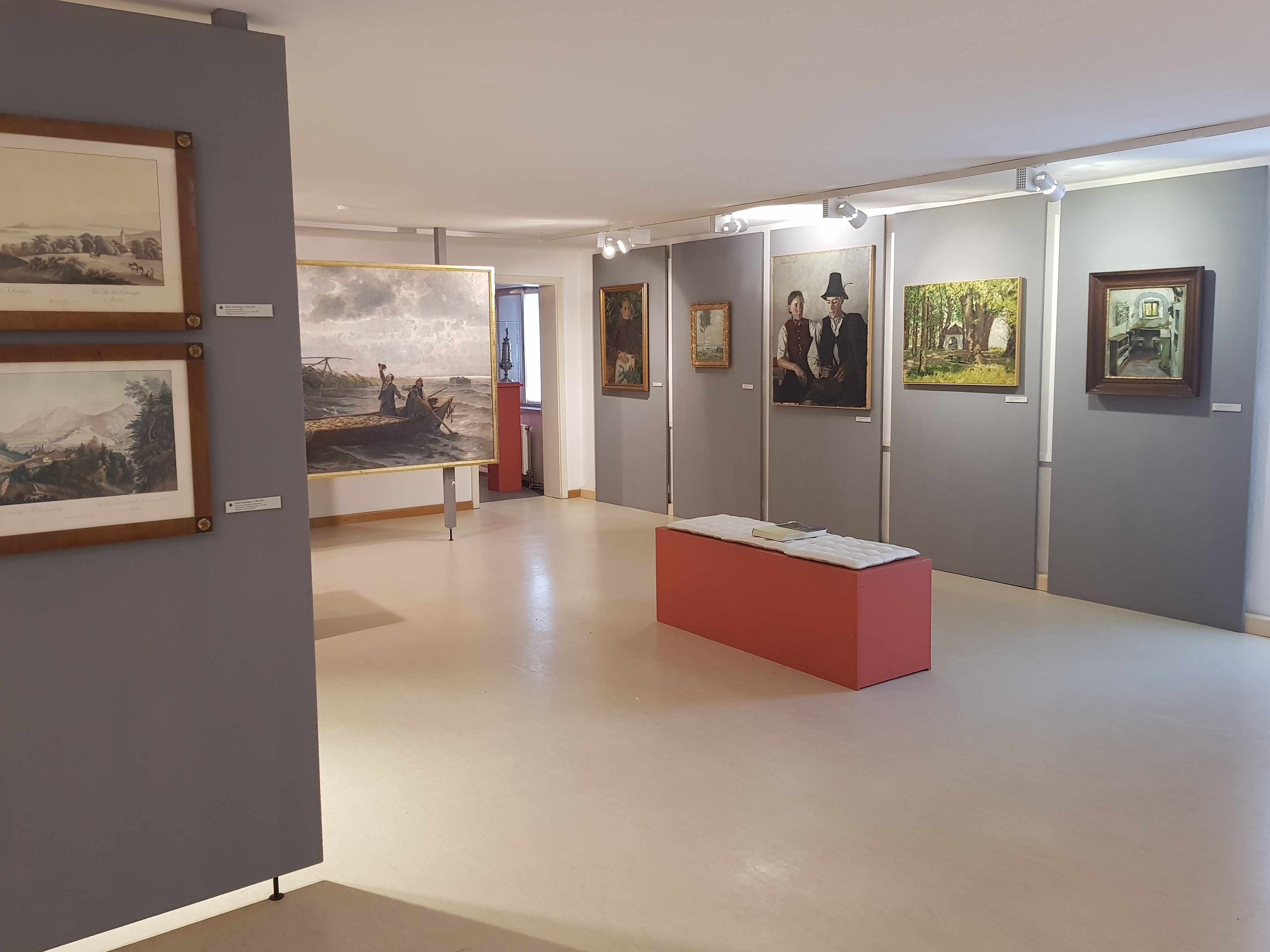 Ein Galerieraum der Chiemseemaler im Heimatmuseum Prien